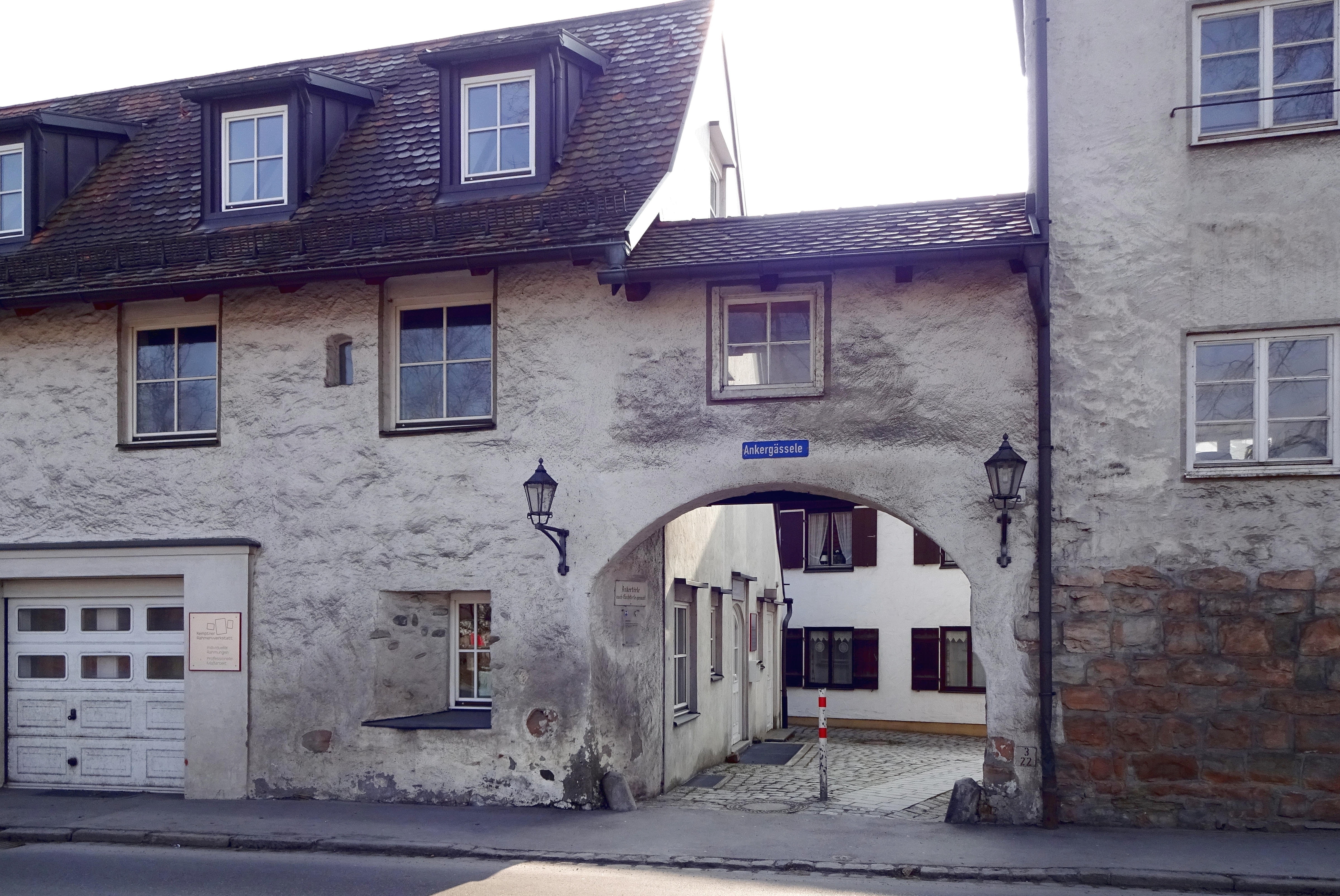 März 2015